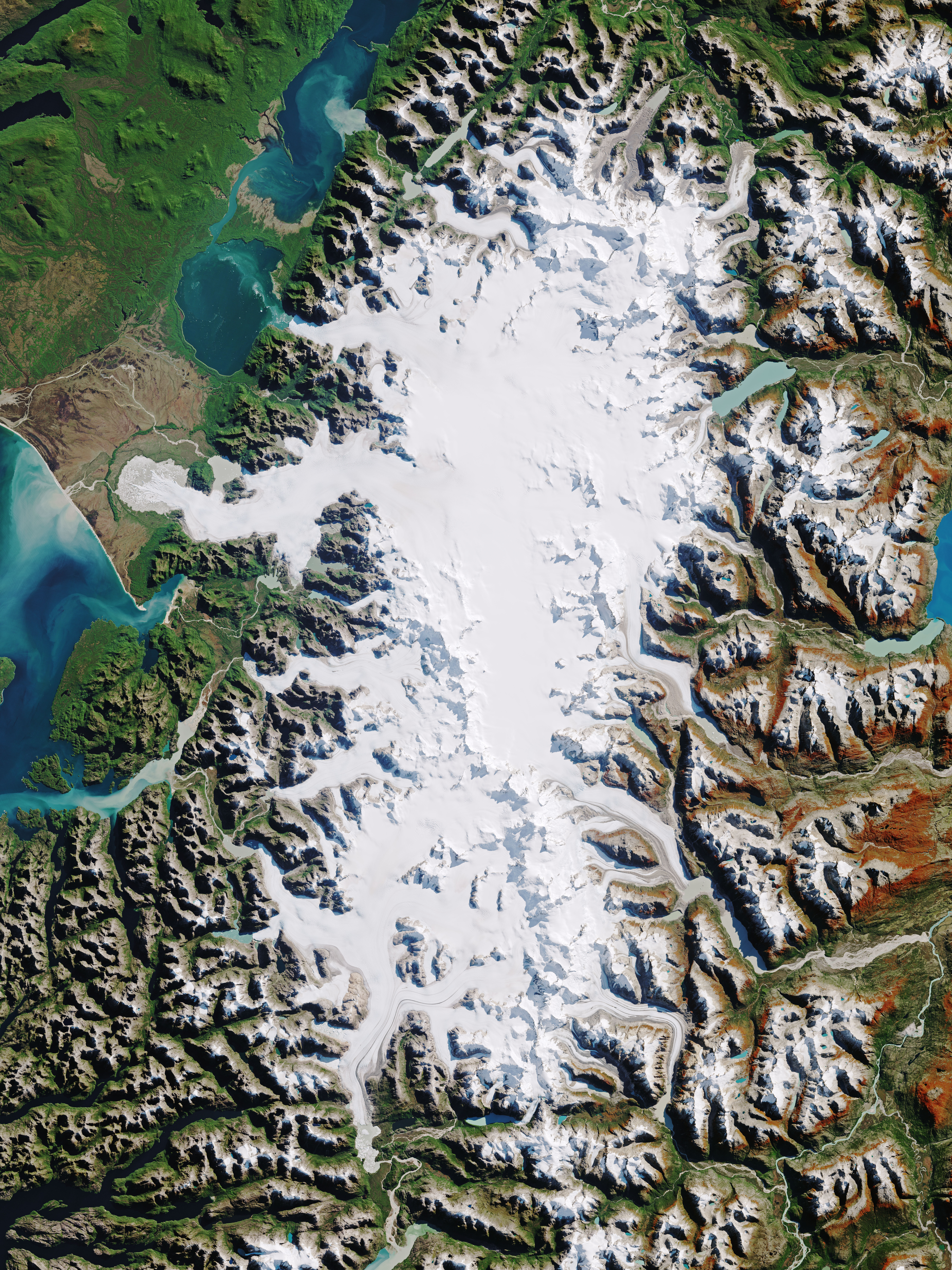 Foto satelital del Campo de Hielo Patagónico Norte